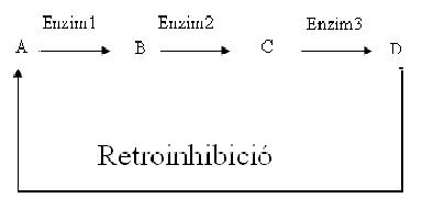 enzymatic feed back